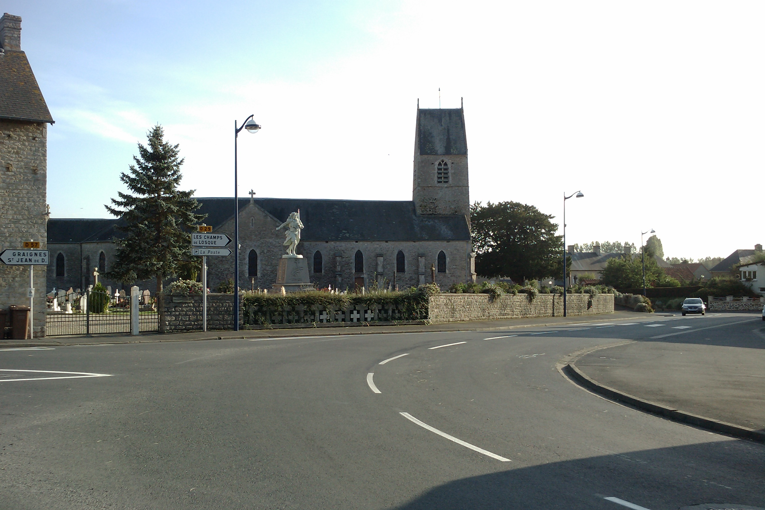 Tribehou et son église